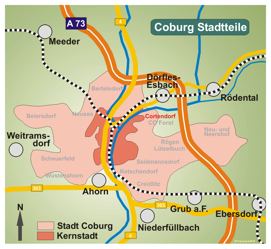 Karte von Coburg, Stadtteil Cortendorf